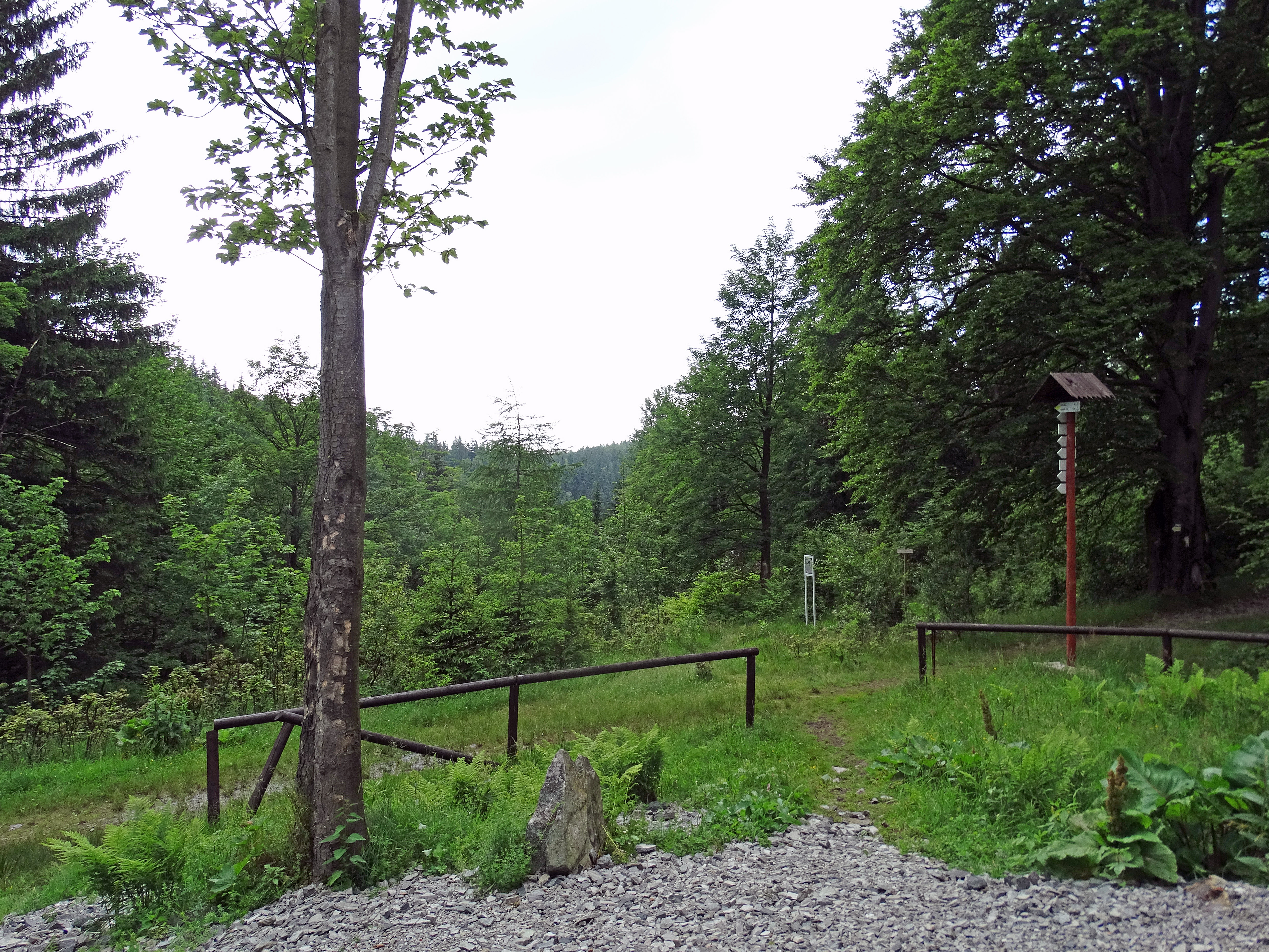 Budniki-widok ogólny